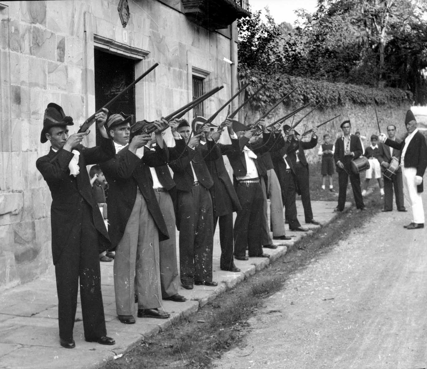 Errebonbilloak agur-tiroa egiten